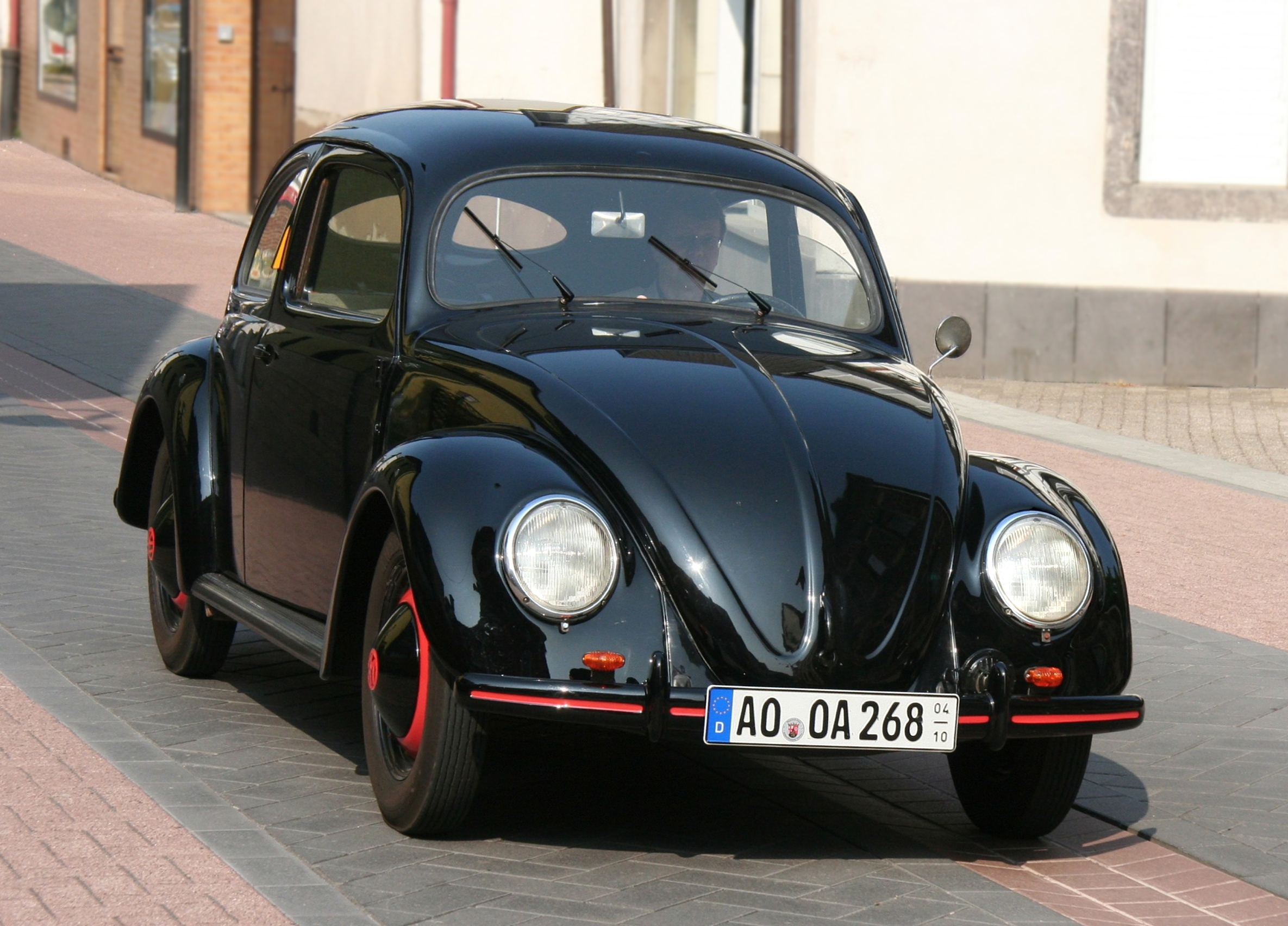 VW Standard, Baujahr 1950 (Blinker und Außenspiegel nicht original; Fantasiekennzeichen)